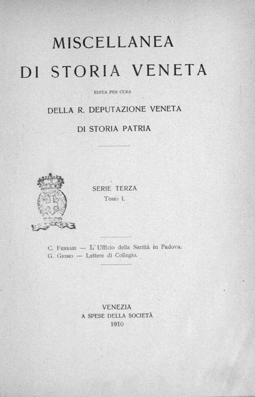 Frontespizio